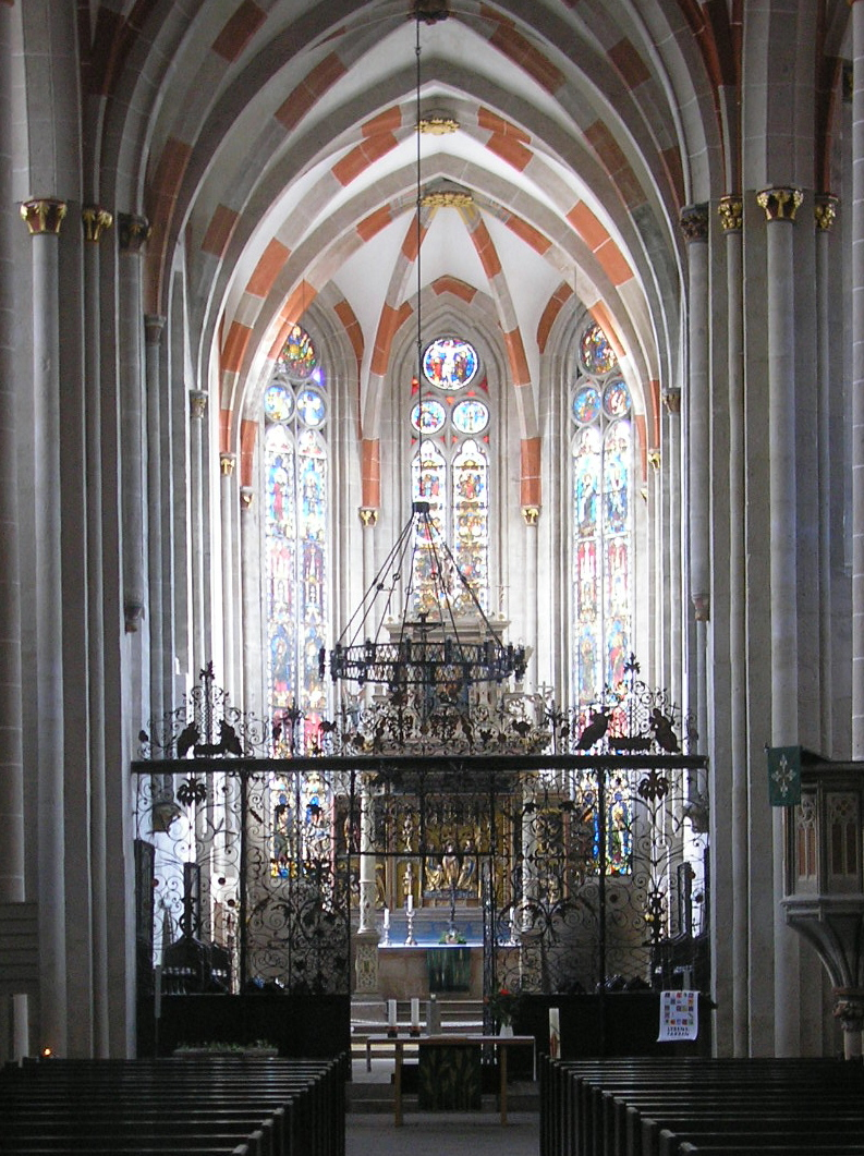 Blick in den Chorraum der St. Blasii-Kirche in Mühlhausen (Thüringen).